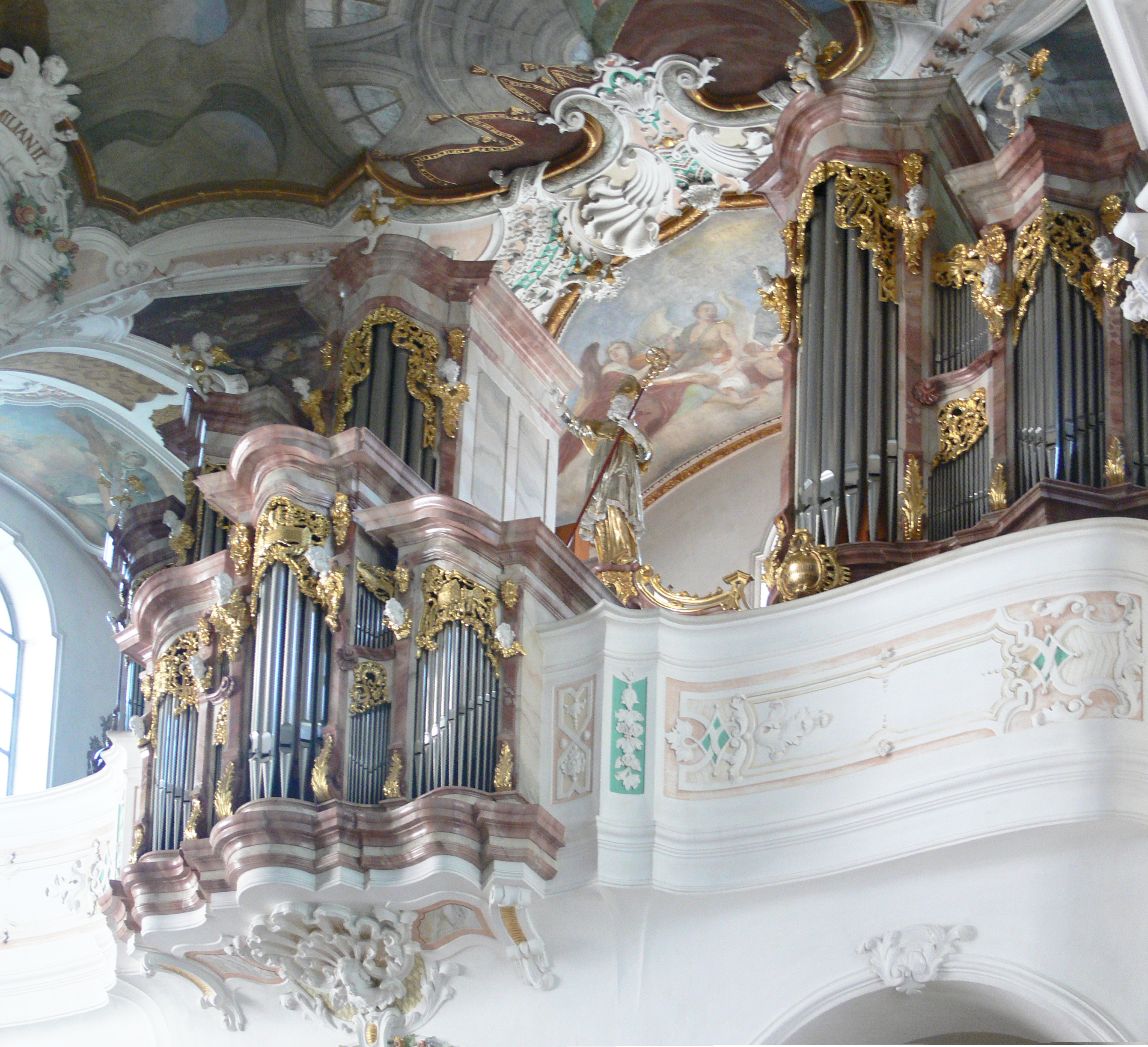 Abteikirche St. Martin, Beuron Hauptorgel (St.-Martinsorgel) aus dem Jahr 1984 mit historisierendem Prospekt nach dem Vorbild der alten Beuroner Orgel (jetzt in Pfullendorf), Fa. Johannes Klais, Bonn